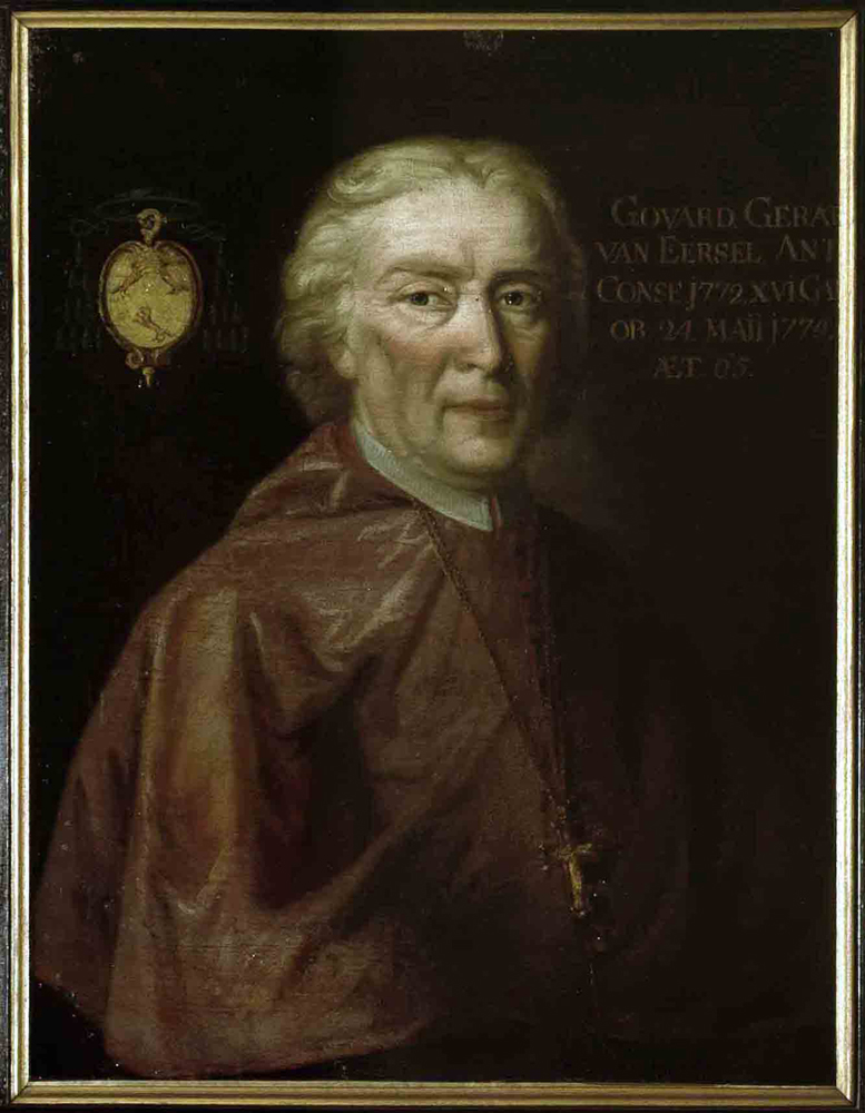 Sint-Baafskathedraal, Gent Portret van Mgr. Govard. Gerard. Van Eersel, inv nr: 499/16